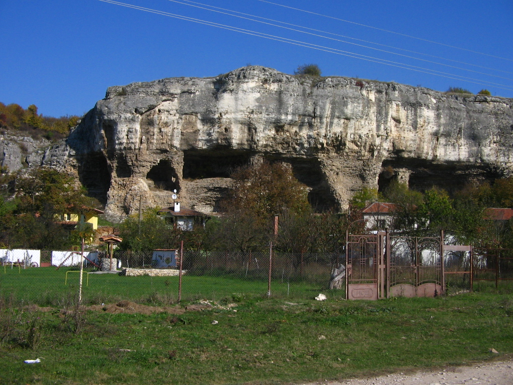 Горталово. Мечока - скална колона и пещери, които са ползвани като скални църкви